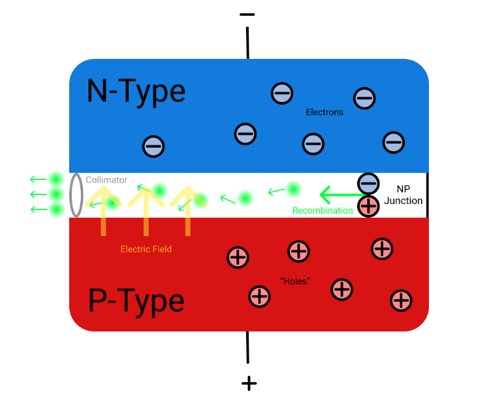 דיאגרמה סכמתית של לייזר דיודה. האלקטרונים המעוררים מתמזגים עם החורים ופולטים אנרגיה בצורה של פוטון. התהליך הקואופרטיבי המונע ע" הזרם החשמלי גורם לעוד ועוד התמזגויות ופליטות (פליטה מאולצת) ולהצטברות פוטונים בצומת NP. בקצה הדיודה ישנו קולימטור (מַקְבֵּל) אשר מרכז את הקרניים כך שינועו במקביל ובאותו הכיוון